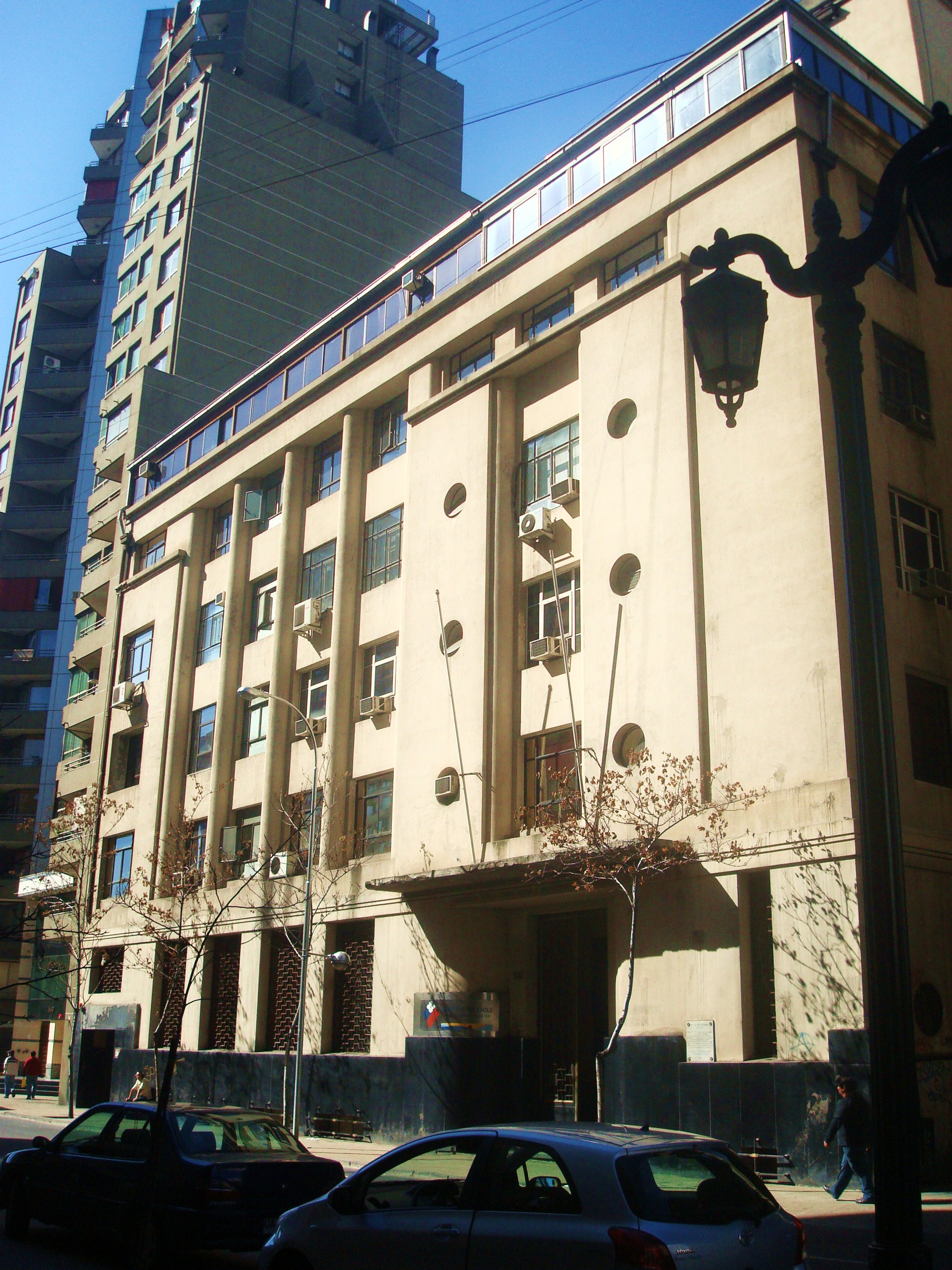 Ministerio de Salud, Santiago de Chile